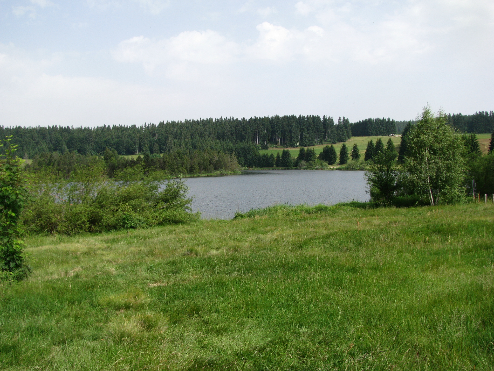 Eschacher Weiher, Ansicht von Süden, Landkreis Oberallgäu